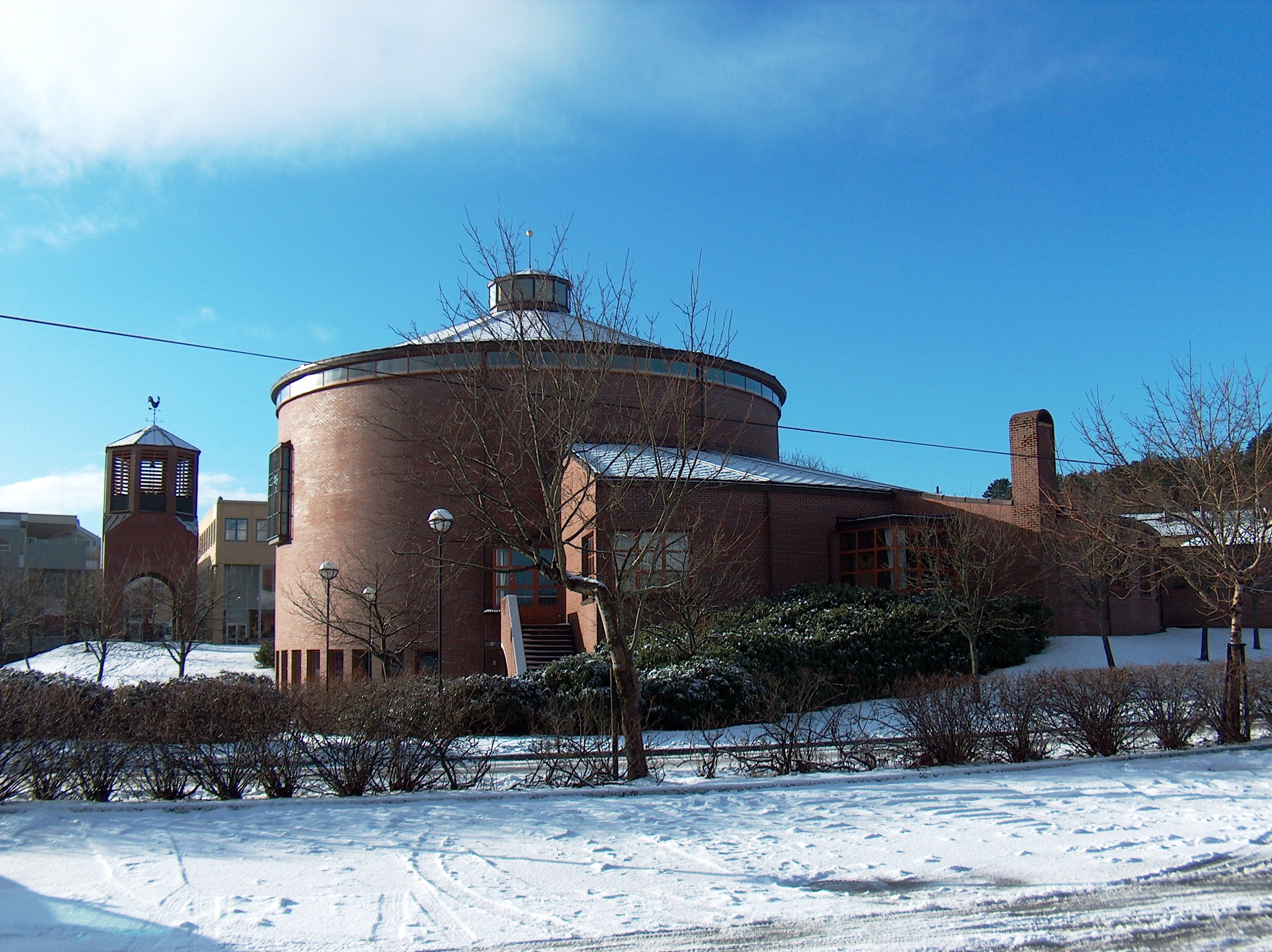 Åsane kirke